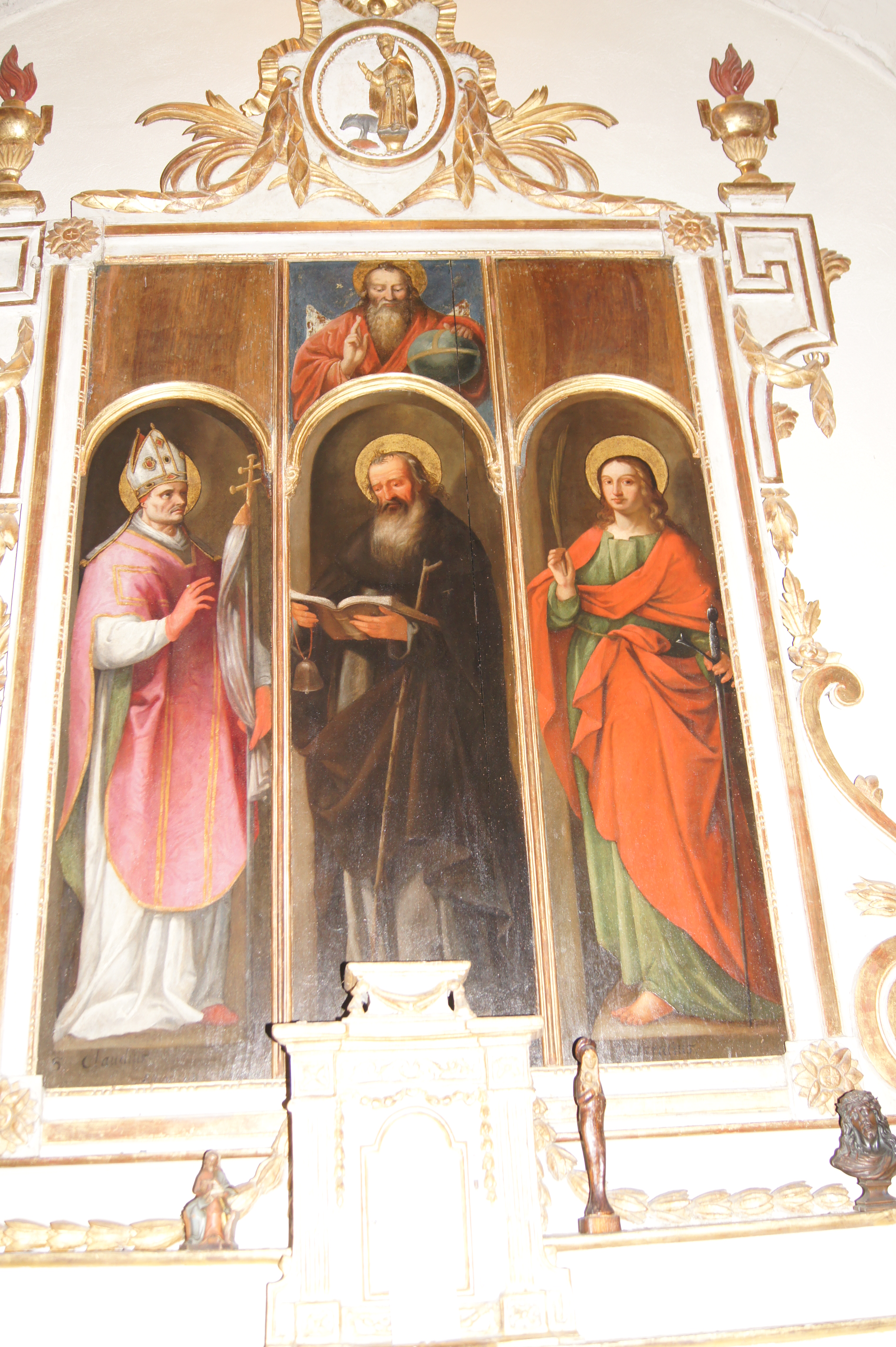 Triptyque de l'église saint Grégoire, oeuvre de l'école des Bréa.